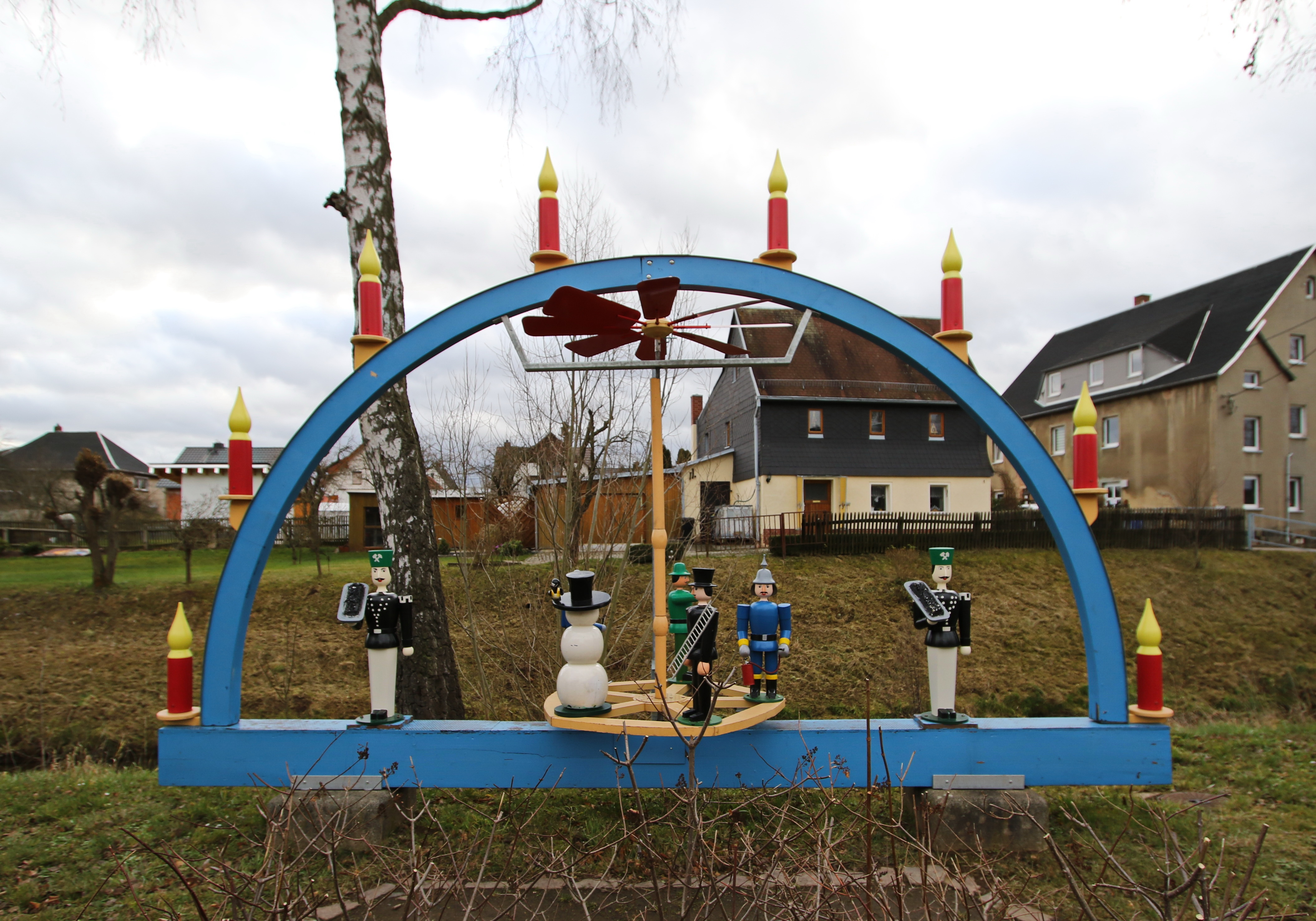 Ortspyramide des Bernsdorfer Ortsteils Rüsdorf. Landkreis Zwickau, Sachsen.